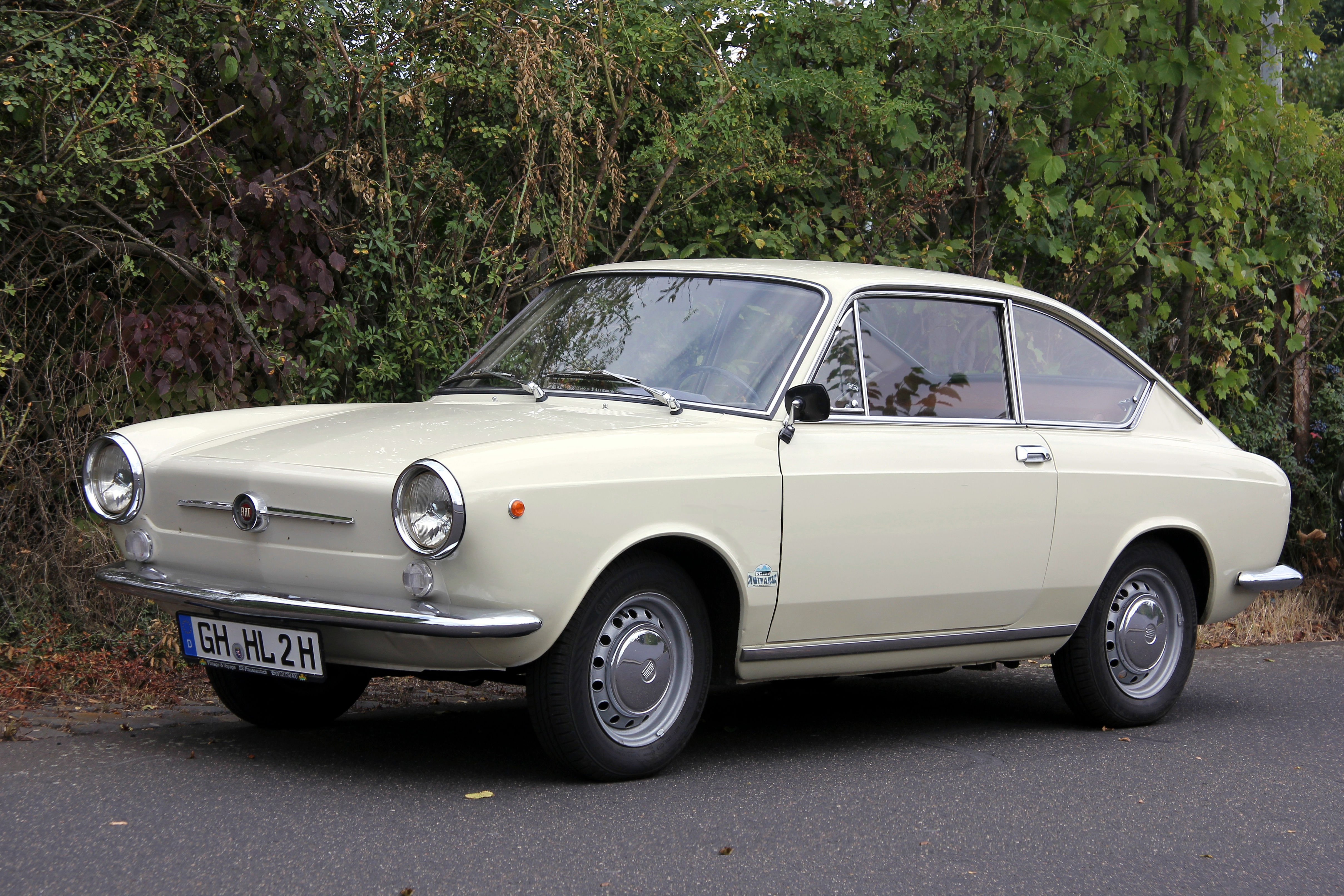 Fiat 850 Coupé der ersten Version, gebaut von 1965 bis 1968. Fiktives Kennzeichen.